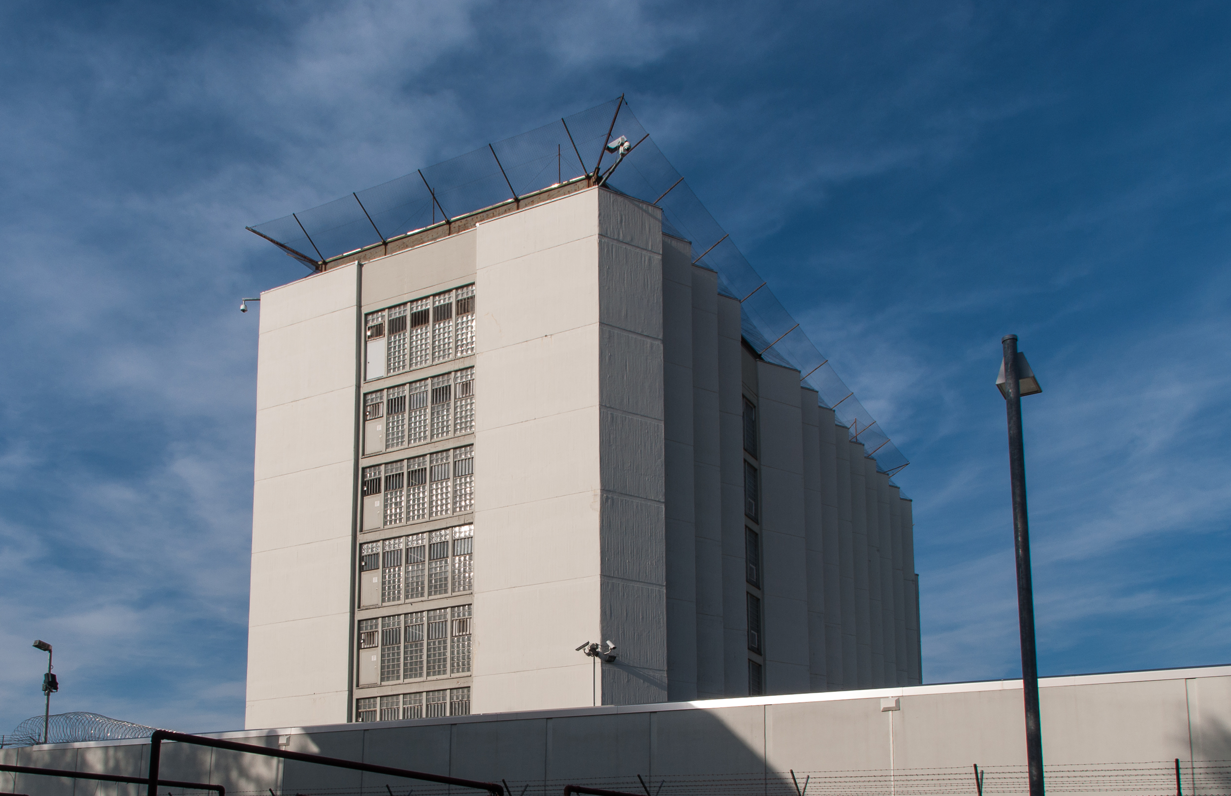 Justizvollzugsanstalt Stuttgart in Stuttgart-Stammheim. In der obersten von sieben Etagen, rechts an der Stirnseite des Gebäudes, befindet sich Haftraum Nr. 719, in dem auch Ulrike Meinhof und Andreas Baader inhaftiert waren.